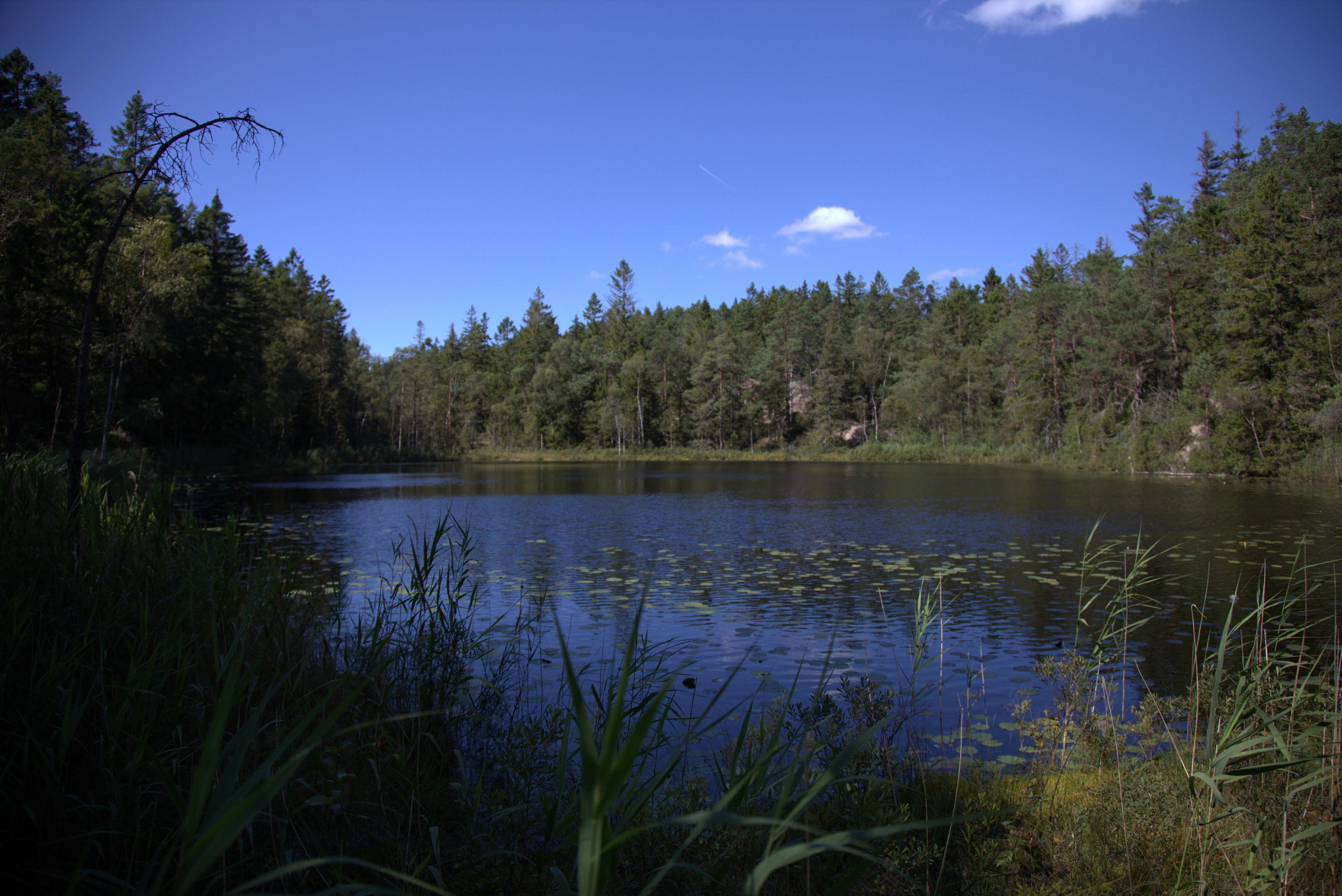 Stora Ottervatten i Stenungsunds kommun.